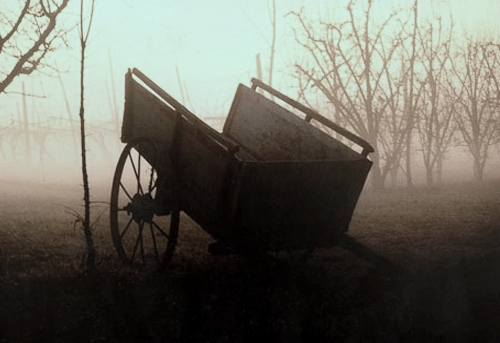 Aratro messo a maggese fra la nebbia - Pianura Padana - Emilia